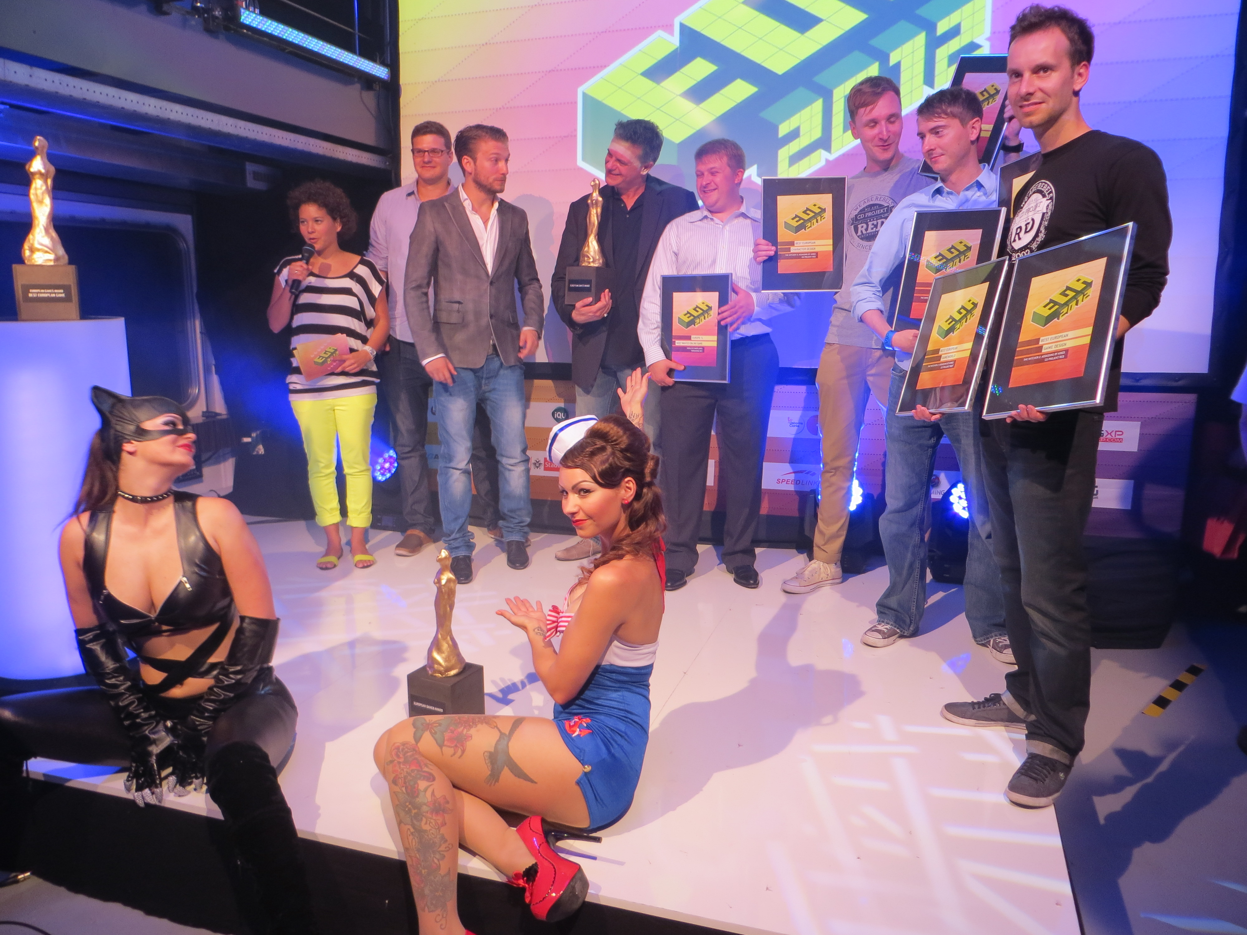 Die Gewinner des European Games Award 1/3